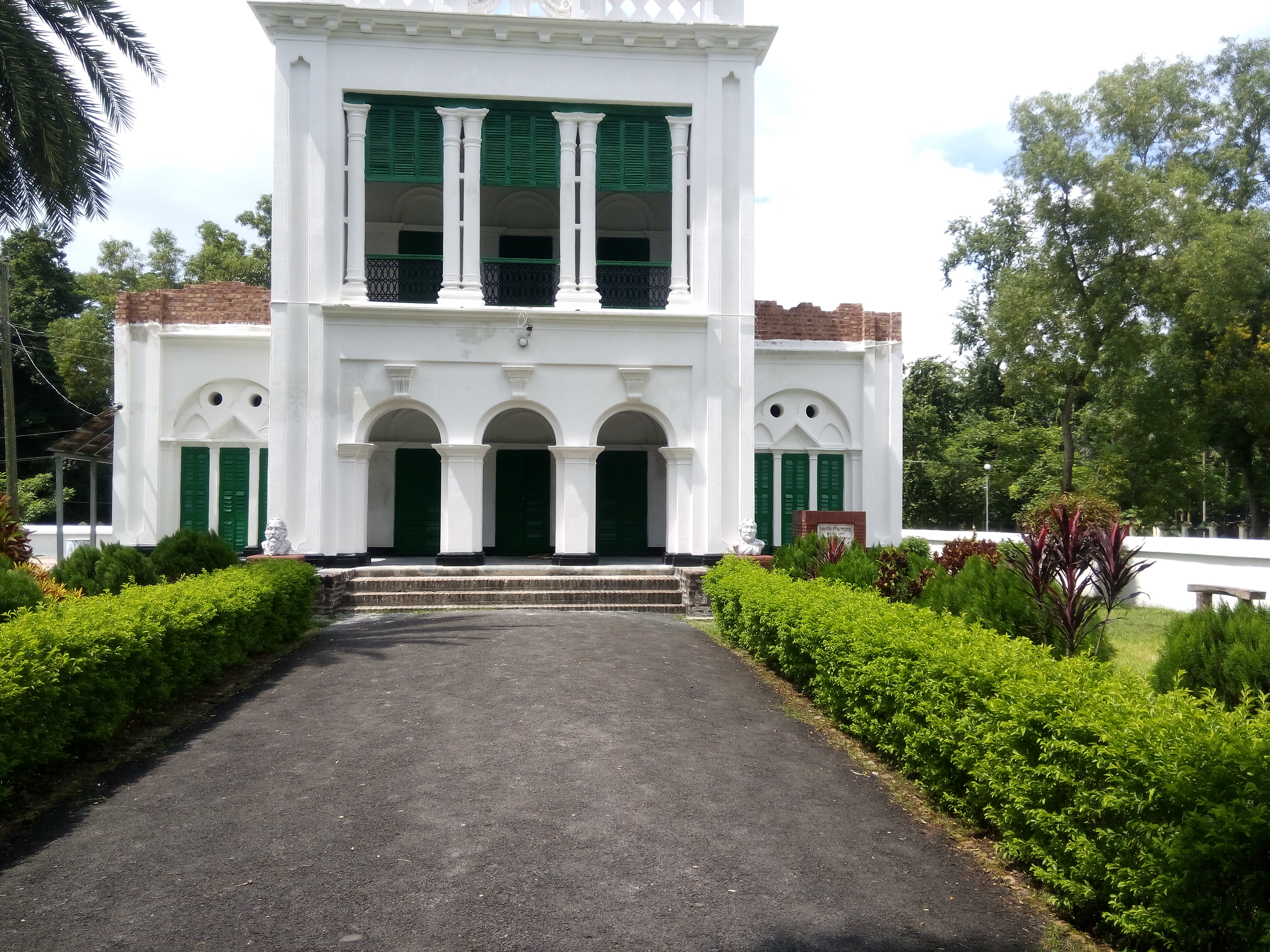 দক্ষিণডিহি রবীন্দ্র কমপ্লেক্স